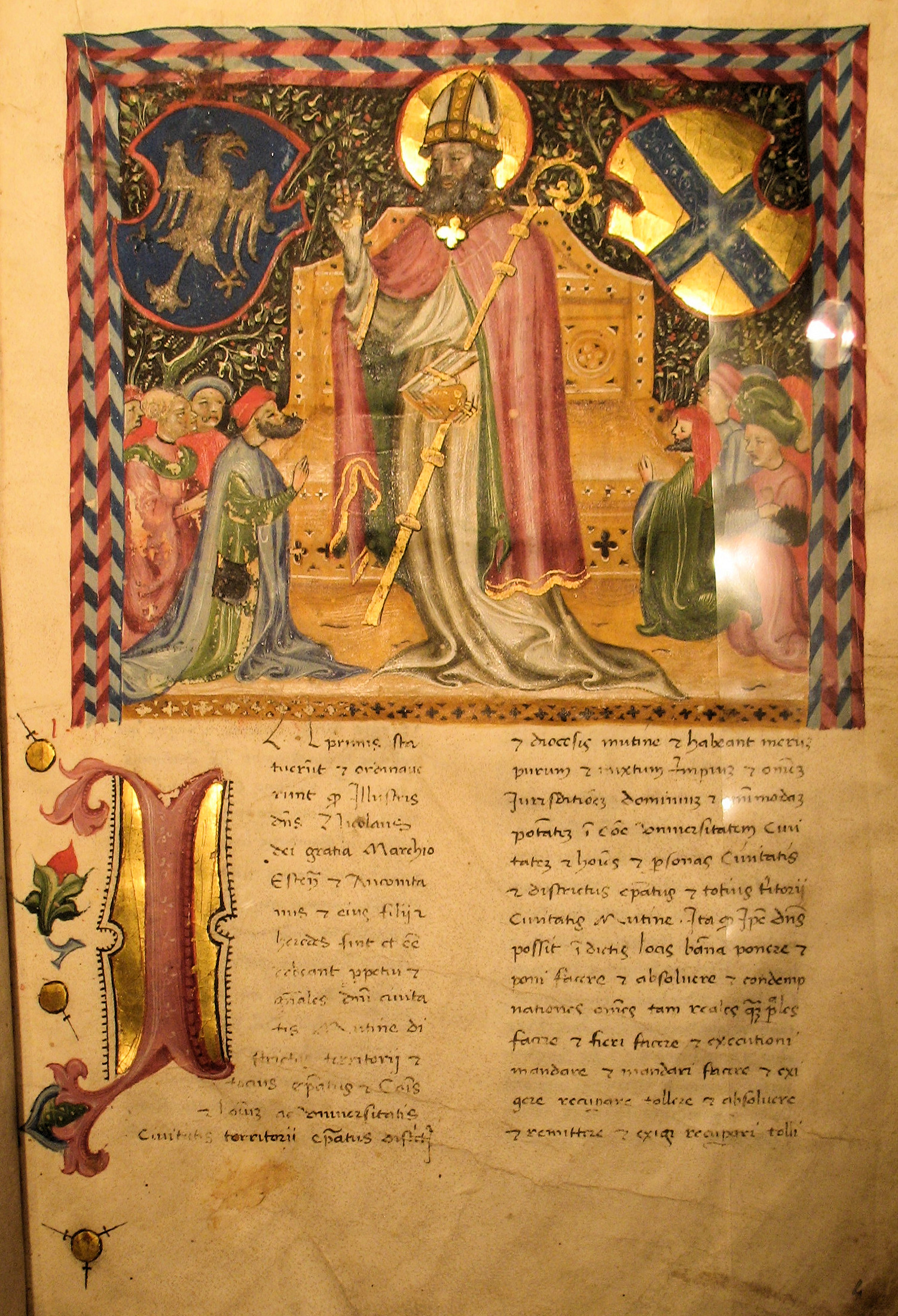 Statuta Mutine Reformata, 1420-1485. Codice membranaceo rilegato in legno e cuoio con placche di ottone lavorato agli angoli e al centro, con fermagli.